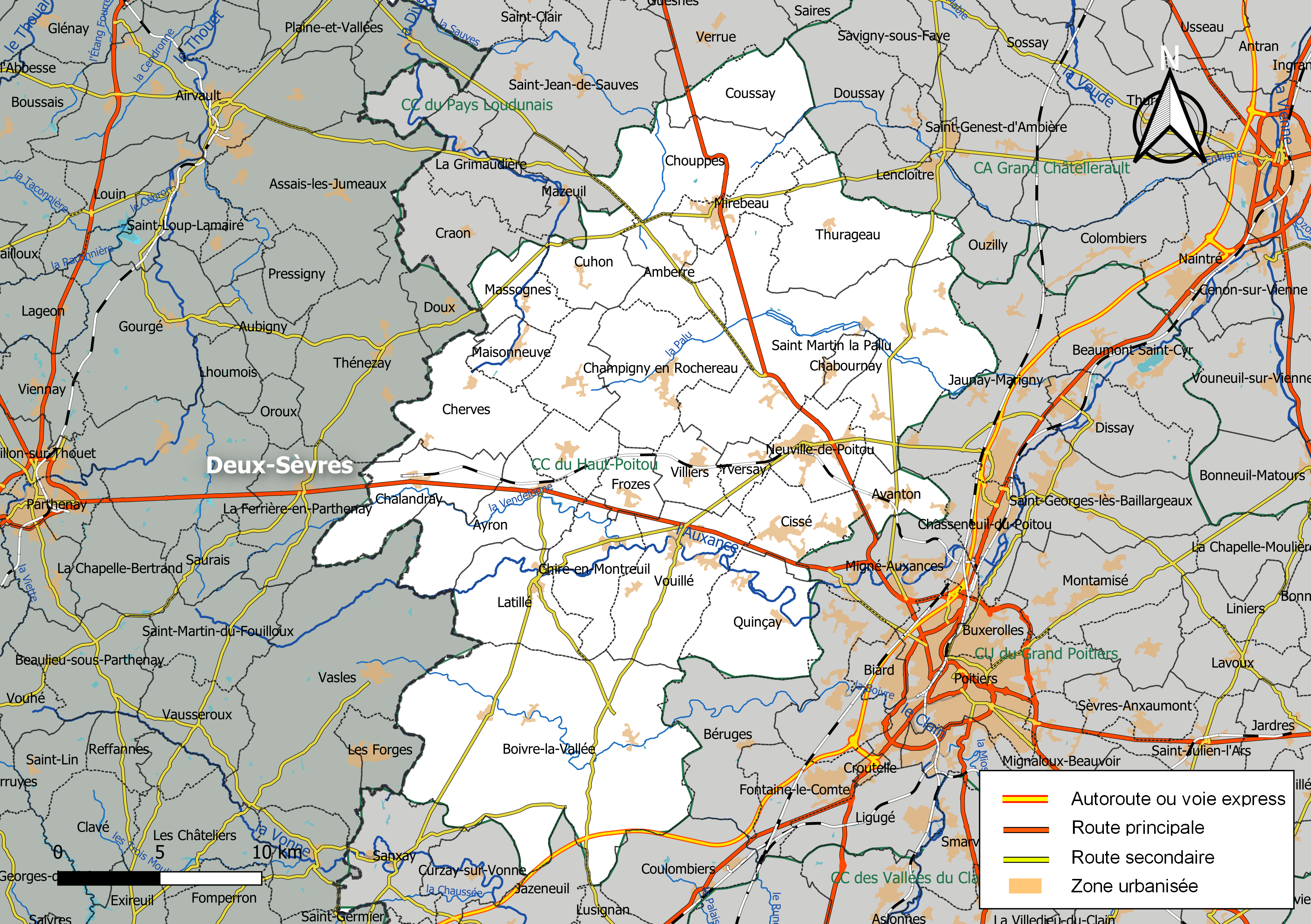 Carte géographique de la Communauté de communes du Haut-Poitou, département de la Vienne, France. Composition au 1er janvier 2019.